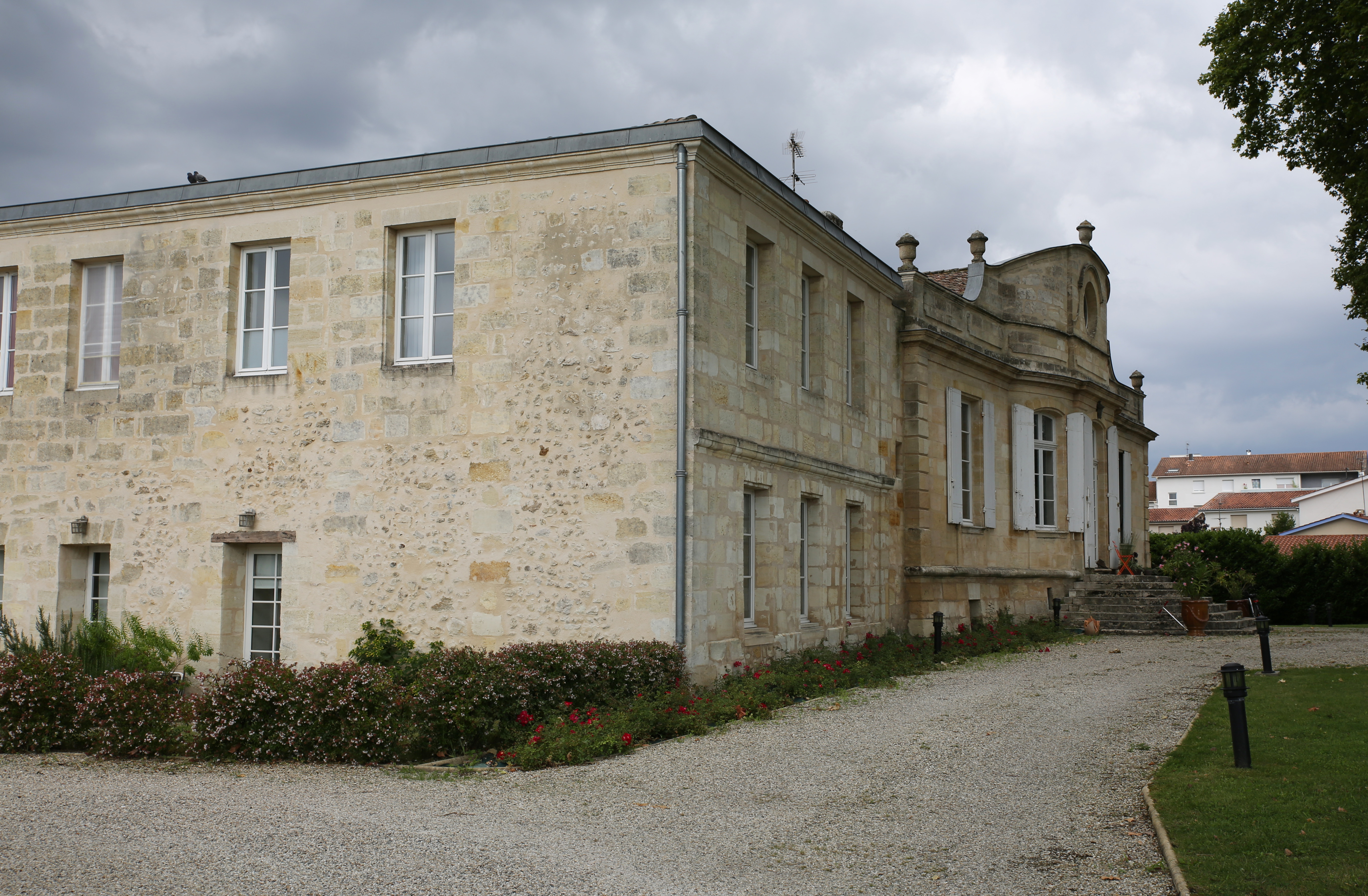 Chartreuse de Fontcastel